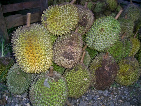 Durio zibethinus fruit, sold at roadside market in Muara Lawa, Kutai Barat, East Kalimantan, Indonesia